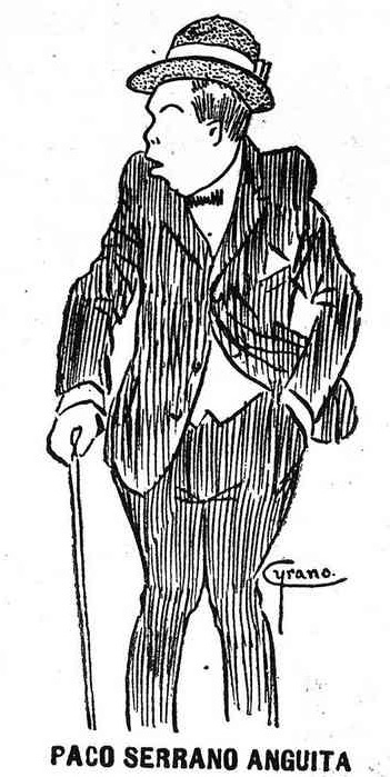 Paco Serrano Anguita.